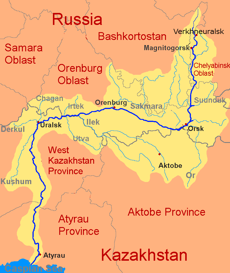 Схема бассейна реки Урал